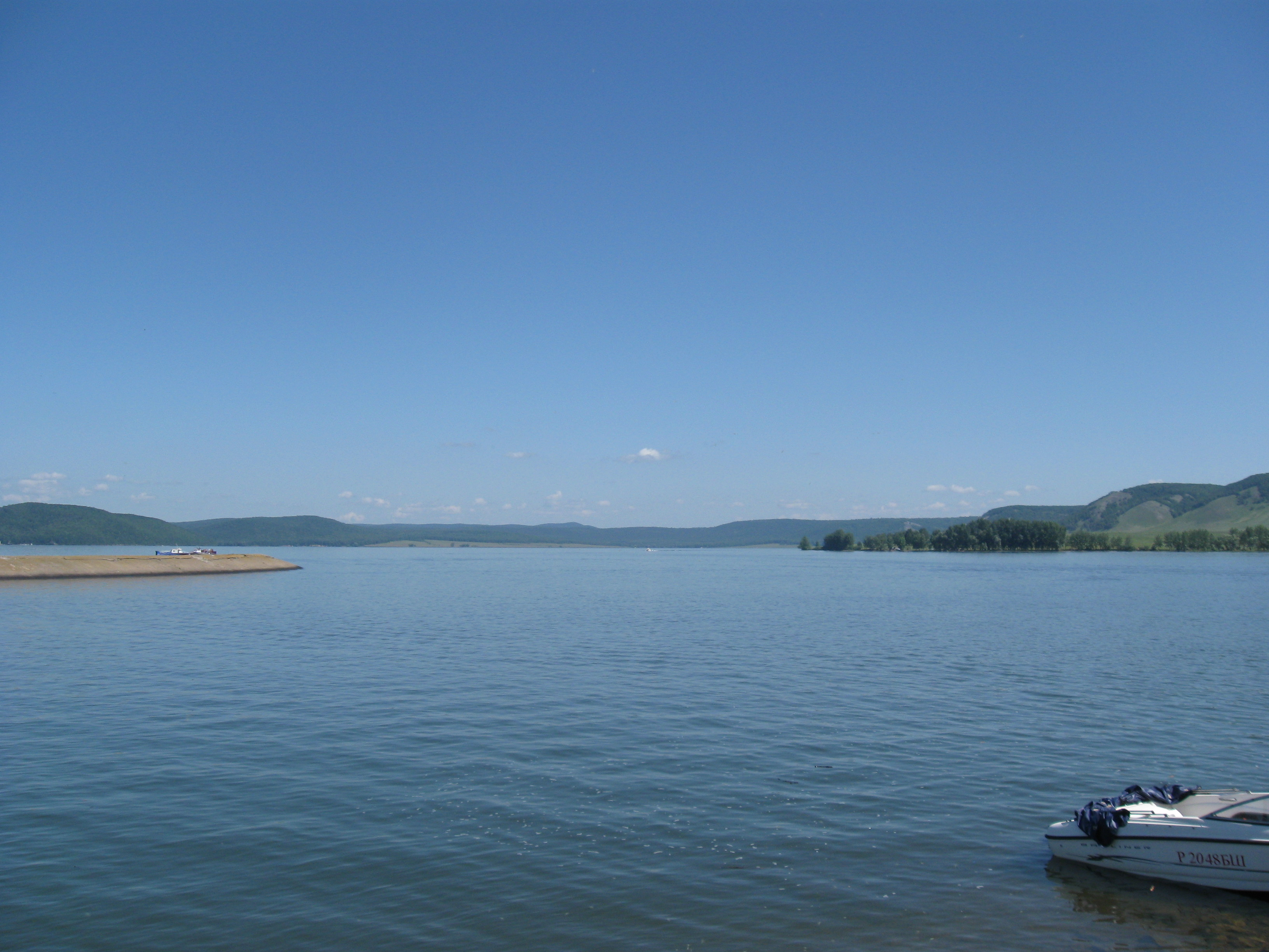 Нугушевское водохранилище